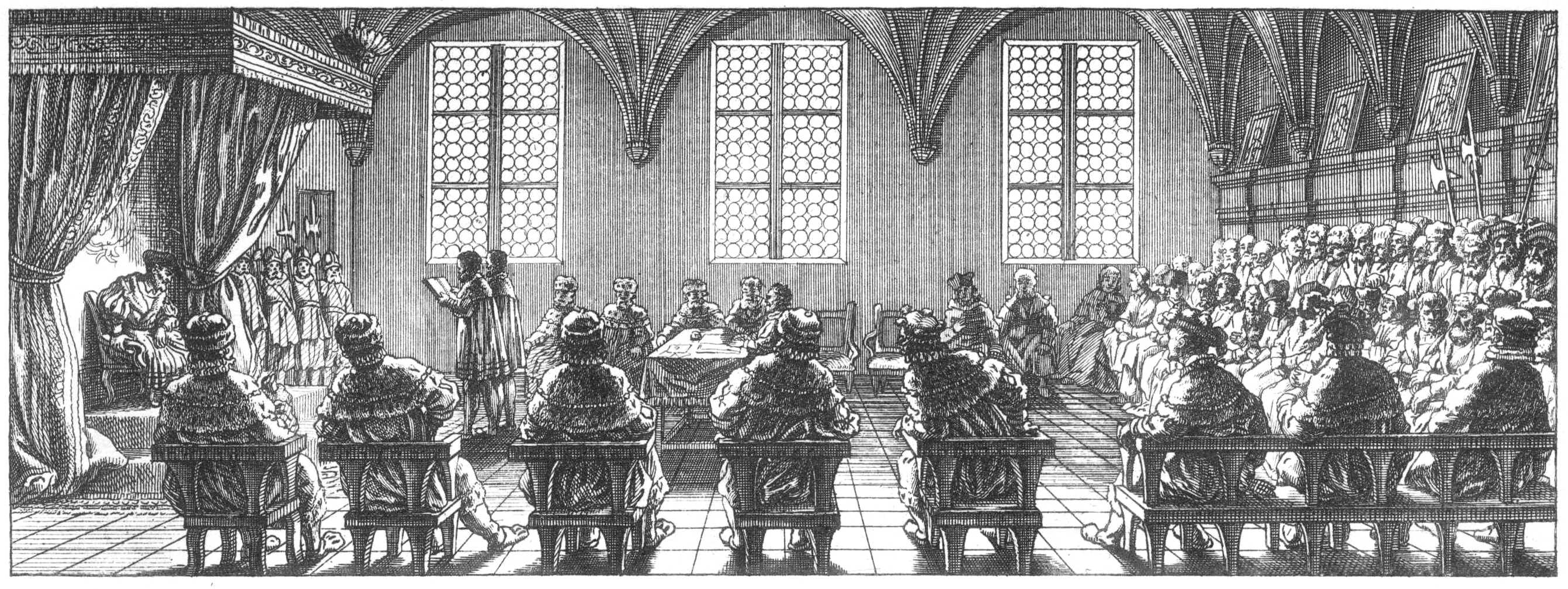 Tab. LXXVIII. Historische Vorstellungen. Die Zahlen bedeuten in Jahrhunderten die Zwischenzeit zwischen einer jeden und einer vorhergehenden Epoche. a) Der Reichstag zu Augsburg, wo dem Kaiser (der unter einem prächtigen Baldachin steht) und den Ständen die Konfession der Protestanten vorgelesen wird. Hinter ihnen sitzen die Sekretäre, und auf beiden Seiten die Kurfürsten, die Reichsfürsten, die Bischöfe, die Prälaten usw. Zur Linken des Throns ist die kaiserliche Wache. (Beschreibung lt. Quelle)